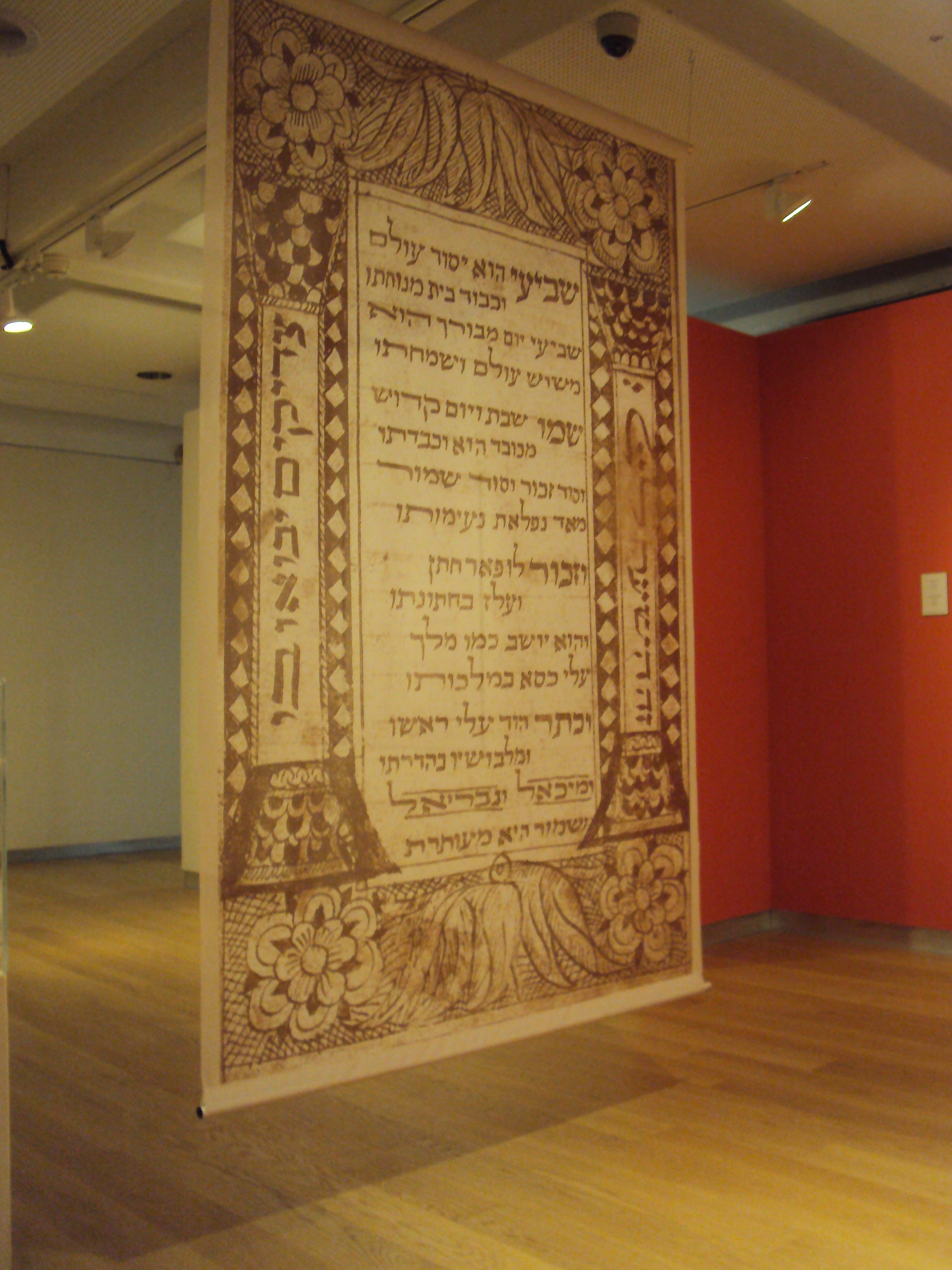 תערוכת יהדות איטליה בבית התפוצות